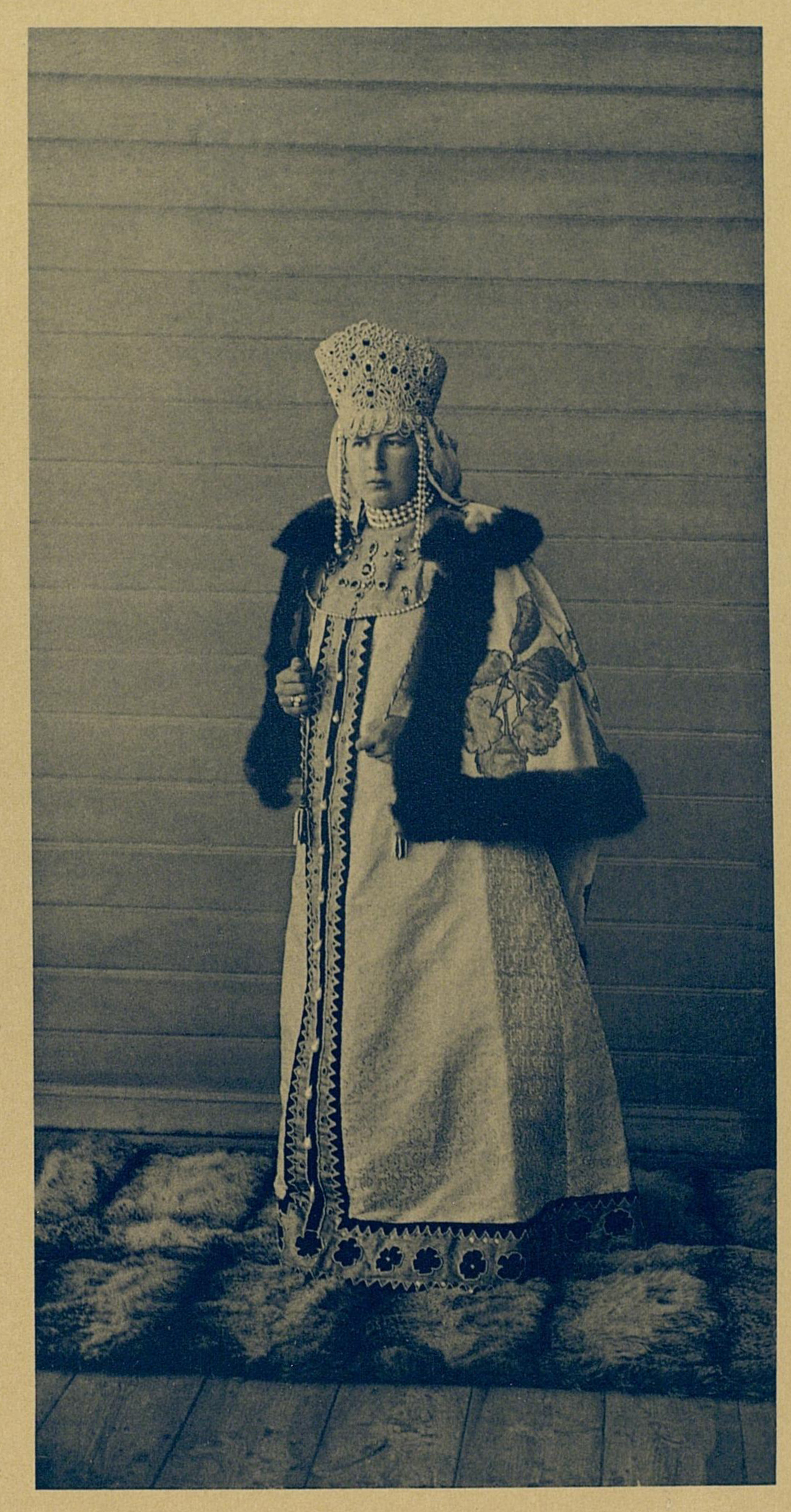 Герцогиня Ольга Николаевна Лейхтенбергская, урождённая Княжна Репнина-Волконская, в одеждах Русской боярыни, времён Царя Алексея Михайловича.